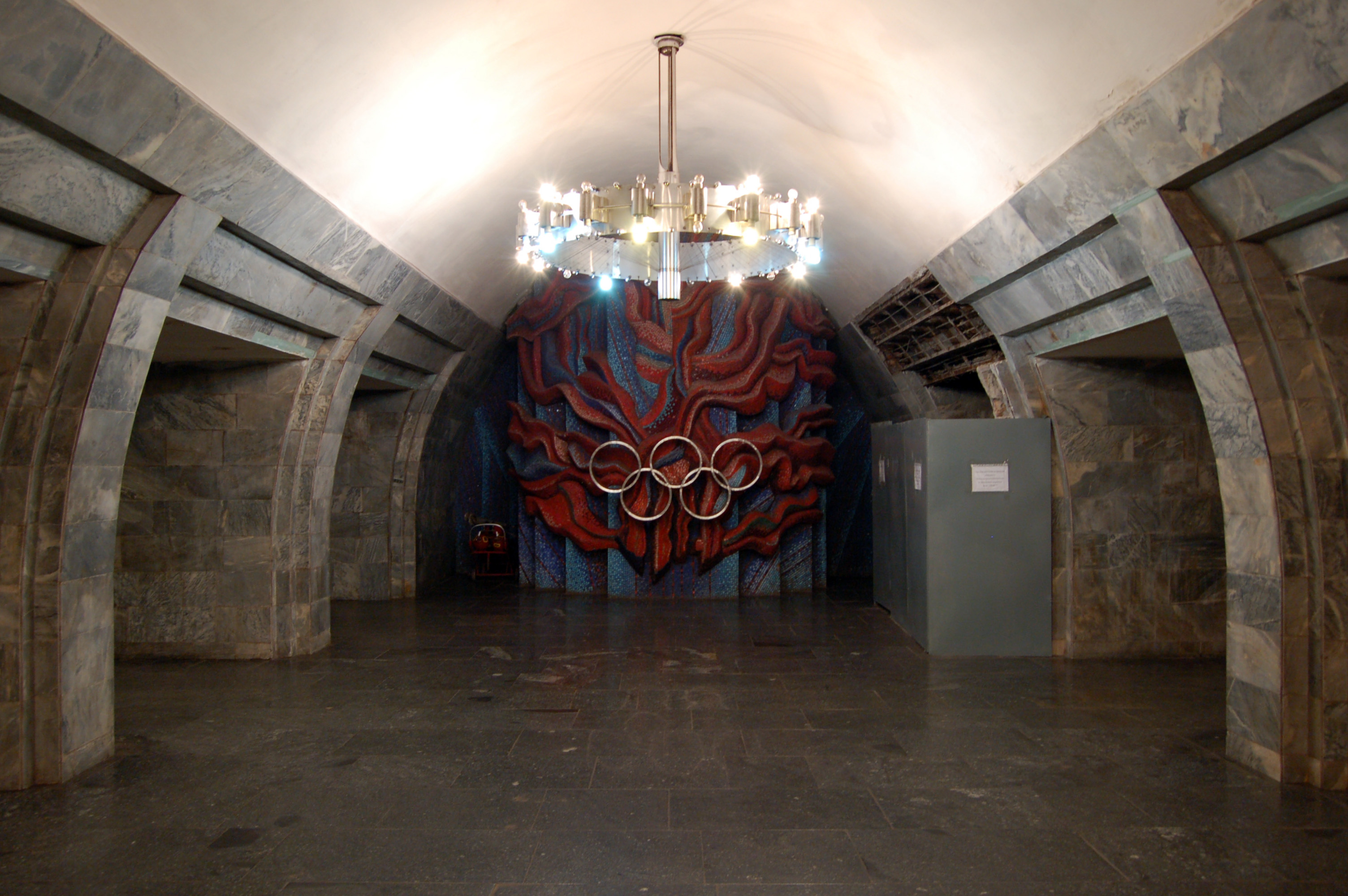 Cтанция метро «Республиканский стадион», композиция «Олимпийский огонь» в торце центрального зала